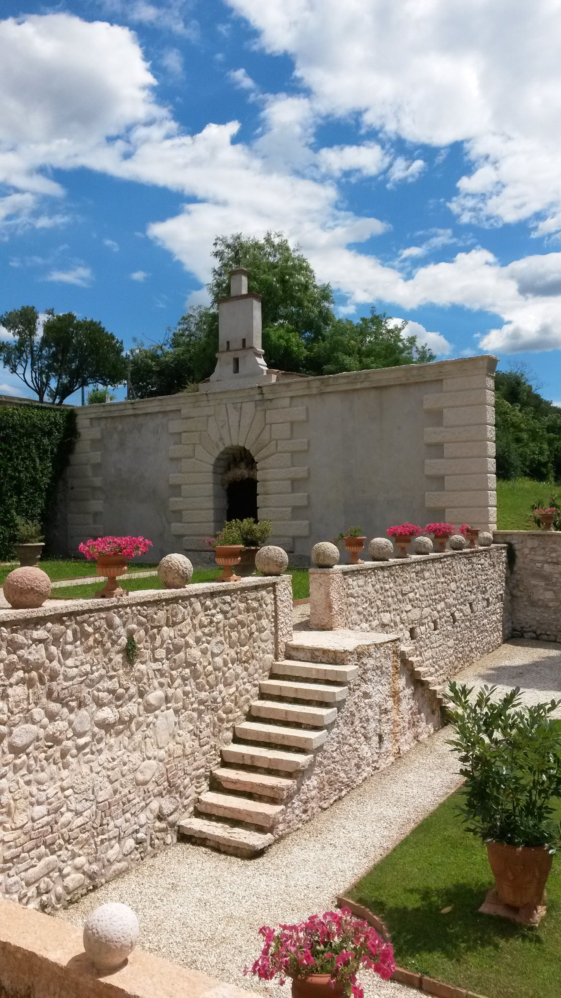 Giardino terrazzato con Grotta-Ninfeo (secolo XVI).